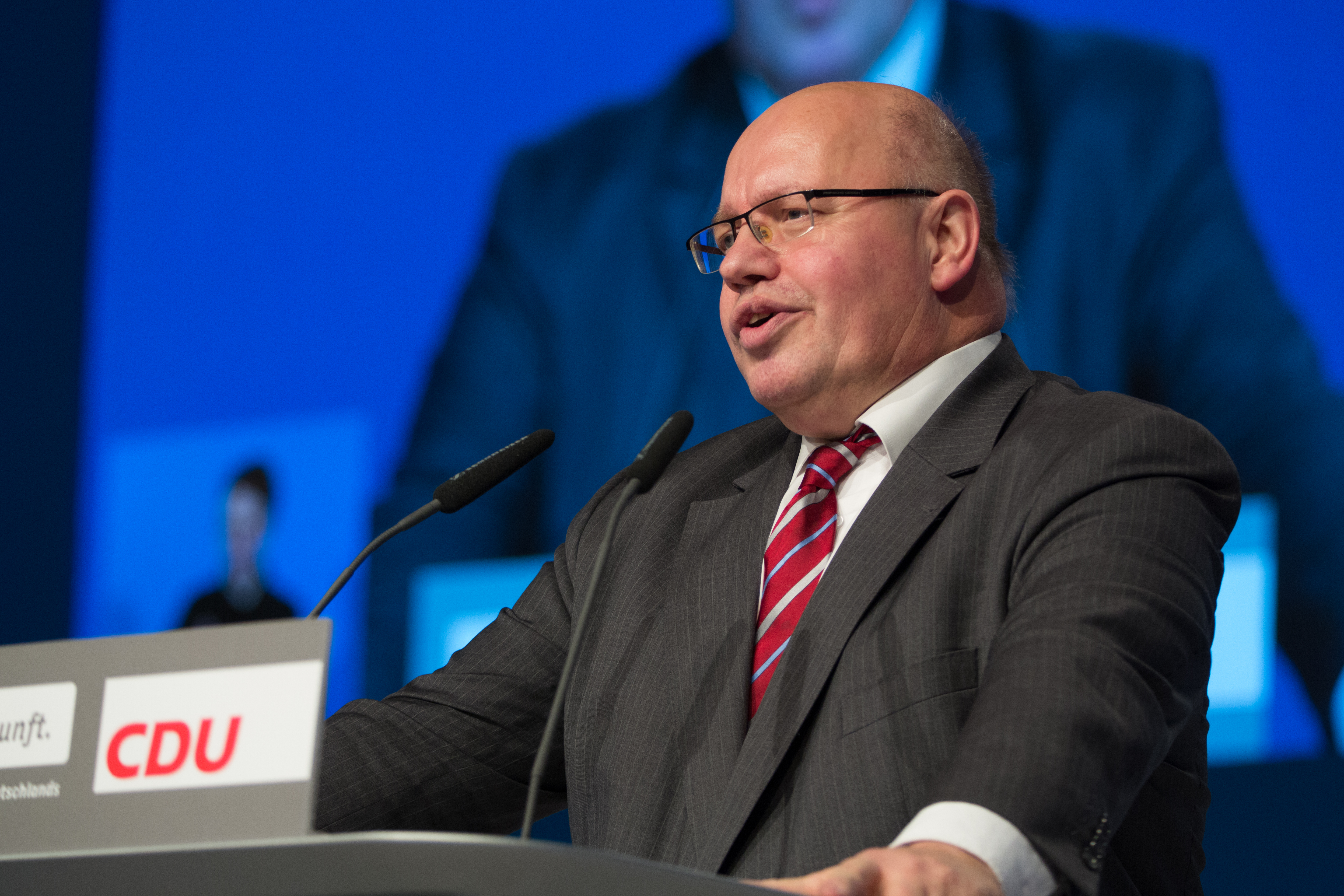 Peter Altmaier, Bundesminister, Chef des Bundeskanzleramtes und Mitglied des CDU Bundesvorstandes auf dem 29. Parteitag der CDU Deutschlands am 6. Dezember 2016 in Essen, Grugahalle